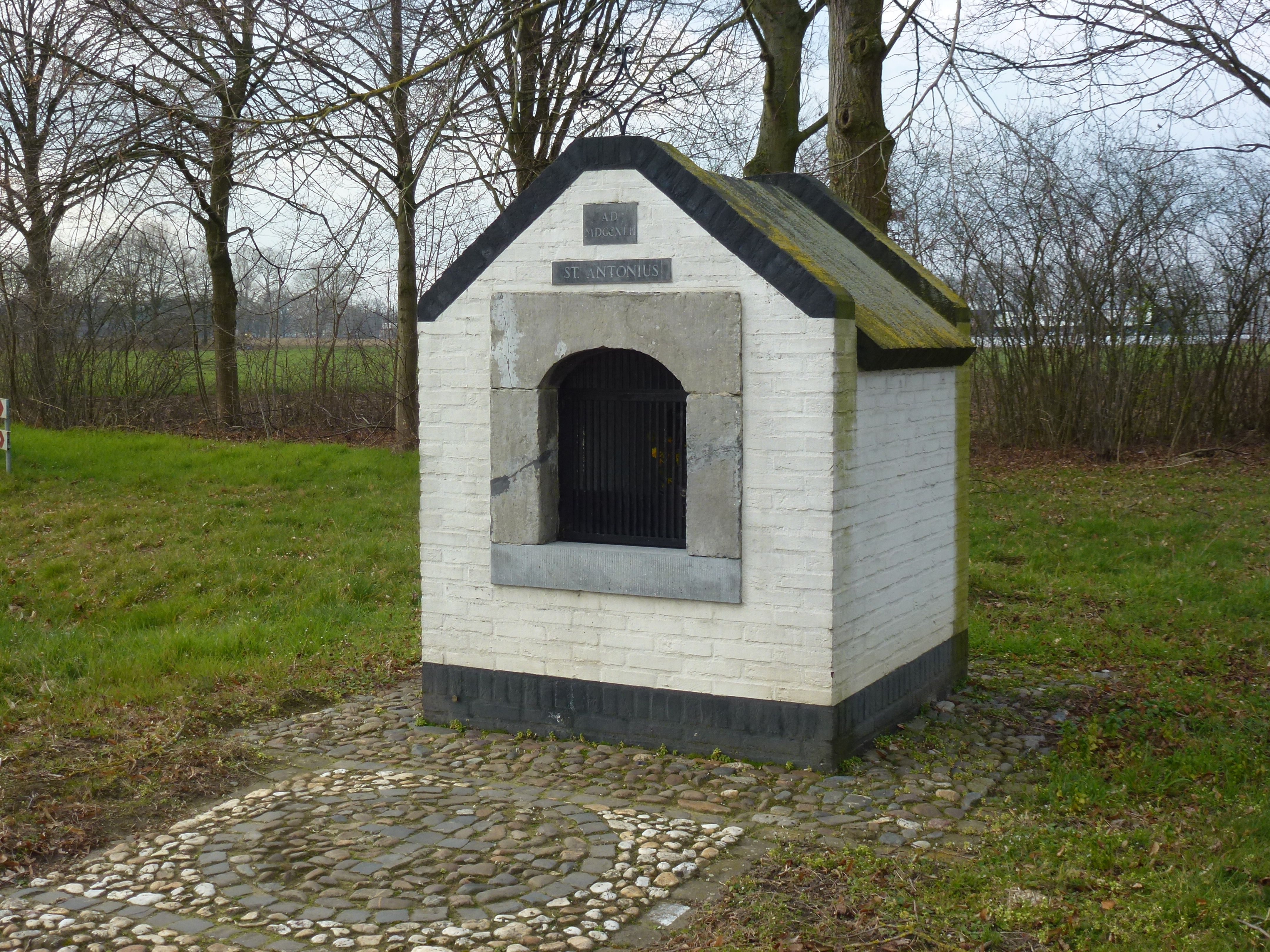 Wegkapelletje H. Antonius, Thorn